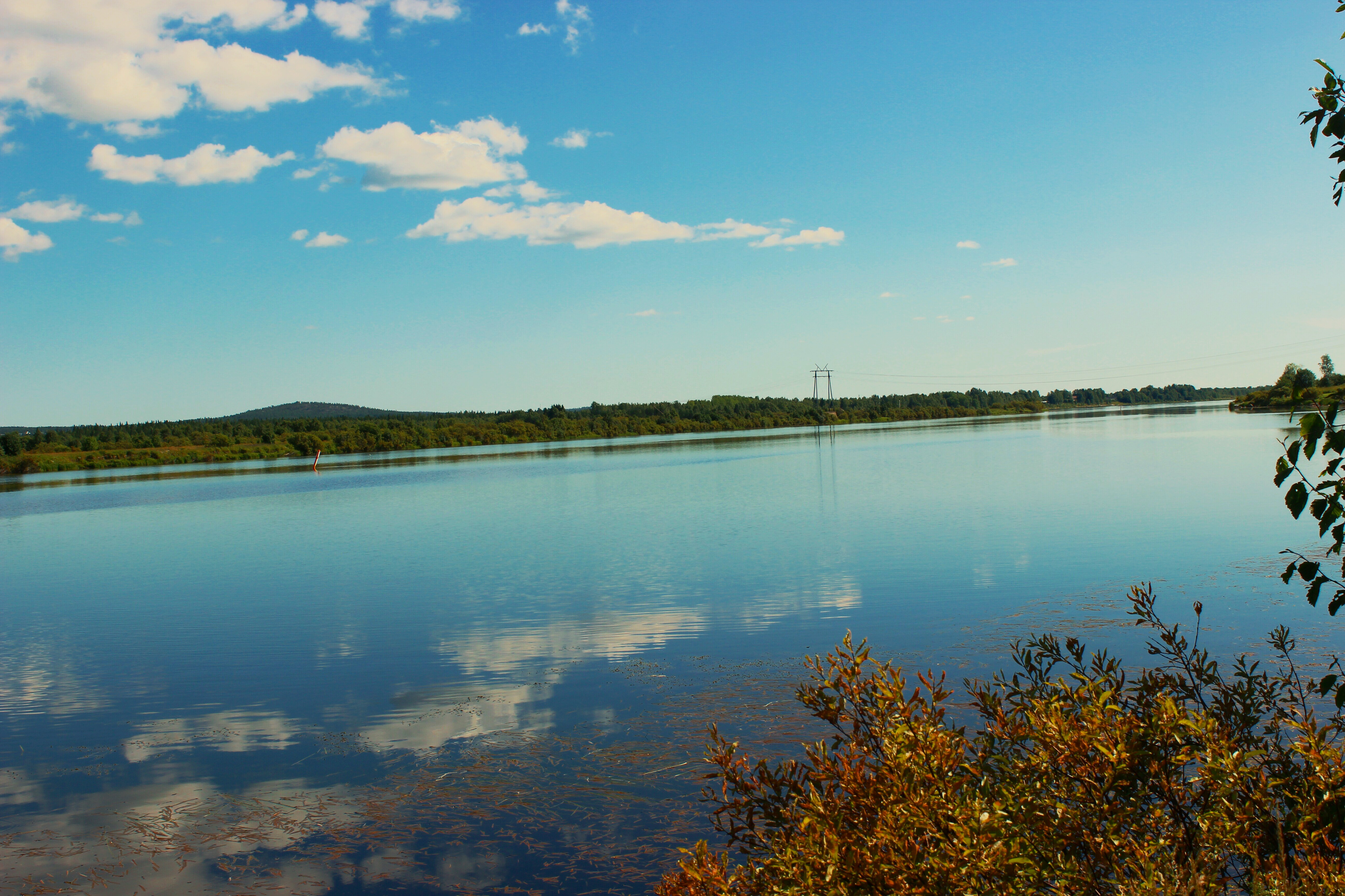 Ounasjoki Rovaniemellä Ylikylän kohdalla